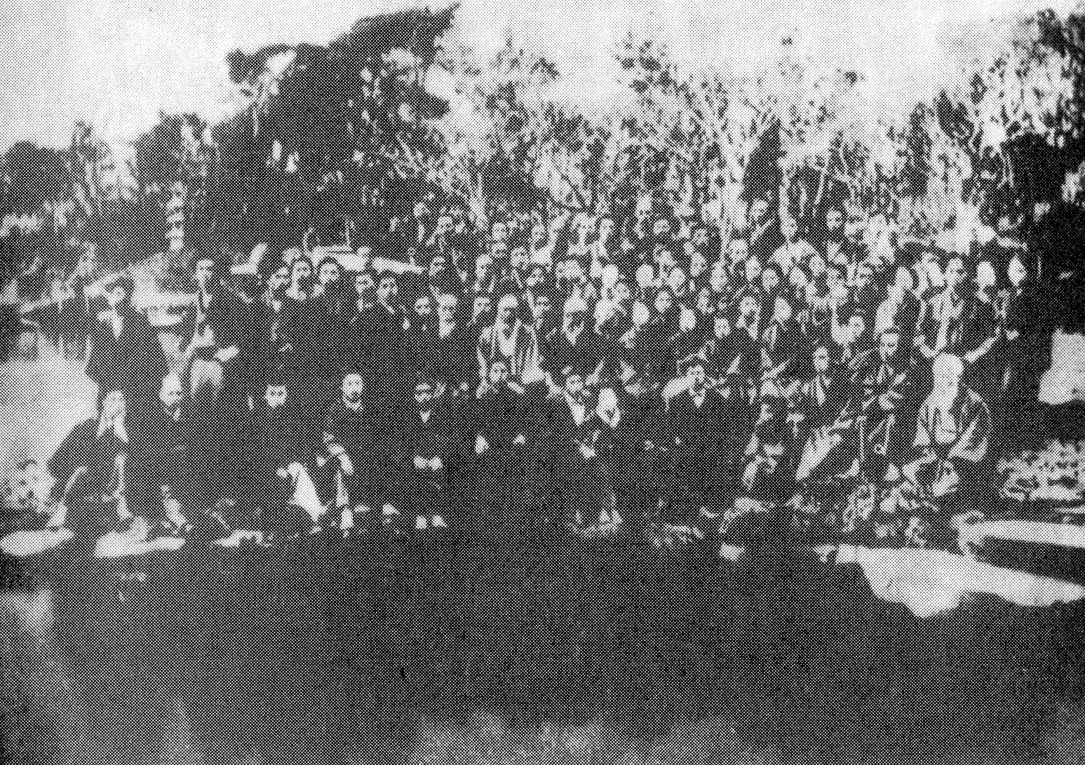 1878年7月15日から7月17日まで行われた。第1回全国信徒親睦会の参加者が原胤昭邸で行った写真撮影。